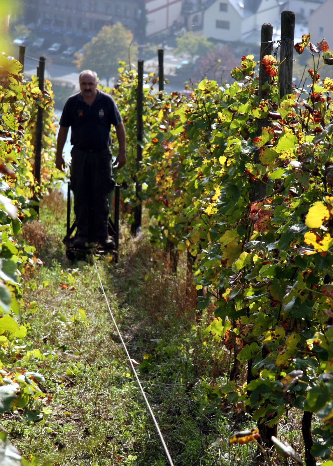 Vendangeur polonais à Rudorfers préparant la descente des raisins, par un treil, vers la cave du village.